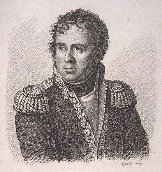 Joseph Sécret Pascal-Vallongue (1763-1806), général de brigade de la Révolution et de l'Empire. Servant dans l'arme du génie, il est tué lors du siège de Gaète en 1806.